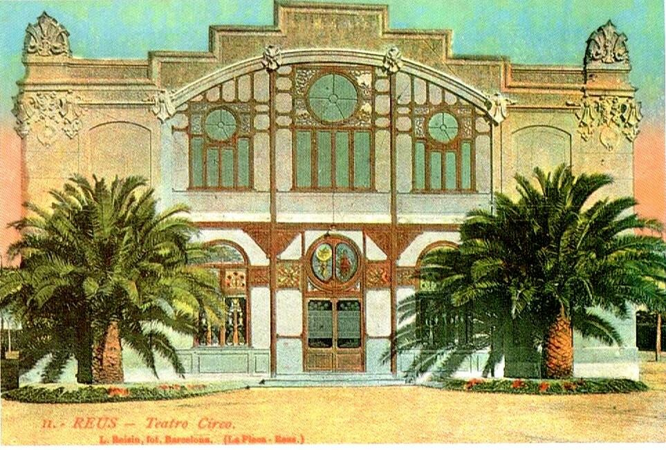 Postal acolorida del Teatre Circ